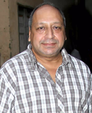 Actor Sudhir Pandey at FWICE's Shradhanjali to Late Shri Dharmesh Tiwari